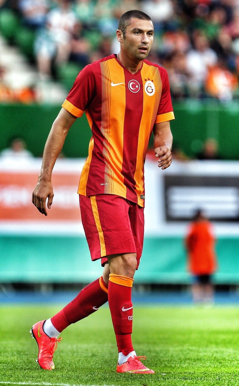 Burak Yılmaz (Wien)